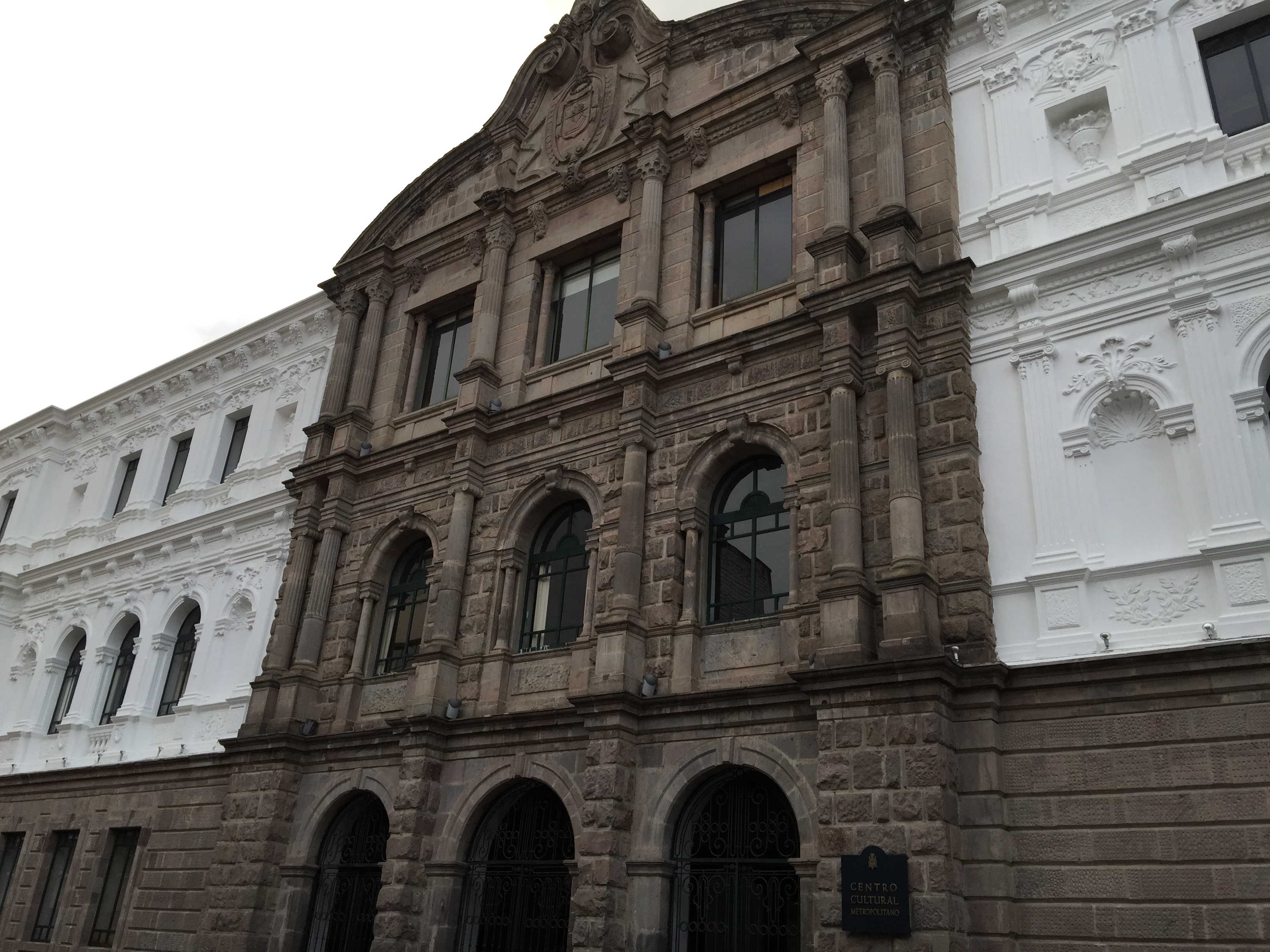 La Escuela Politécnica fue la primera de esta clase en el Ecuador, siendo de las más avanzadas del mundo. Actualmente funciona en este edificio el Centro Cultural Metropolitano.